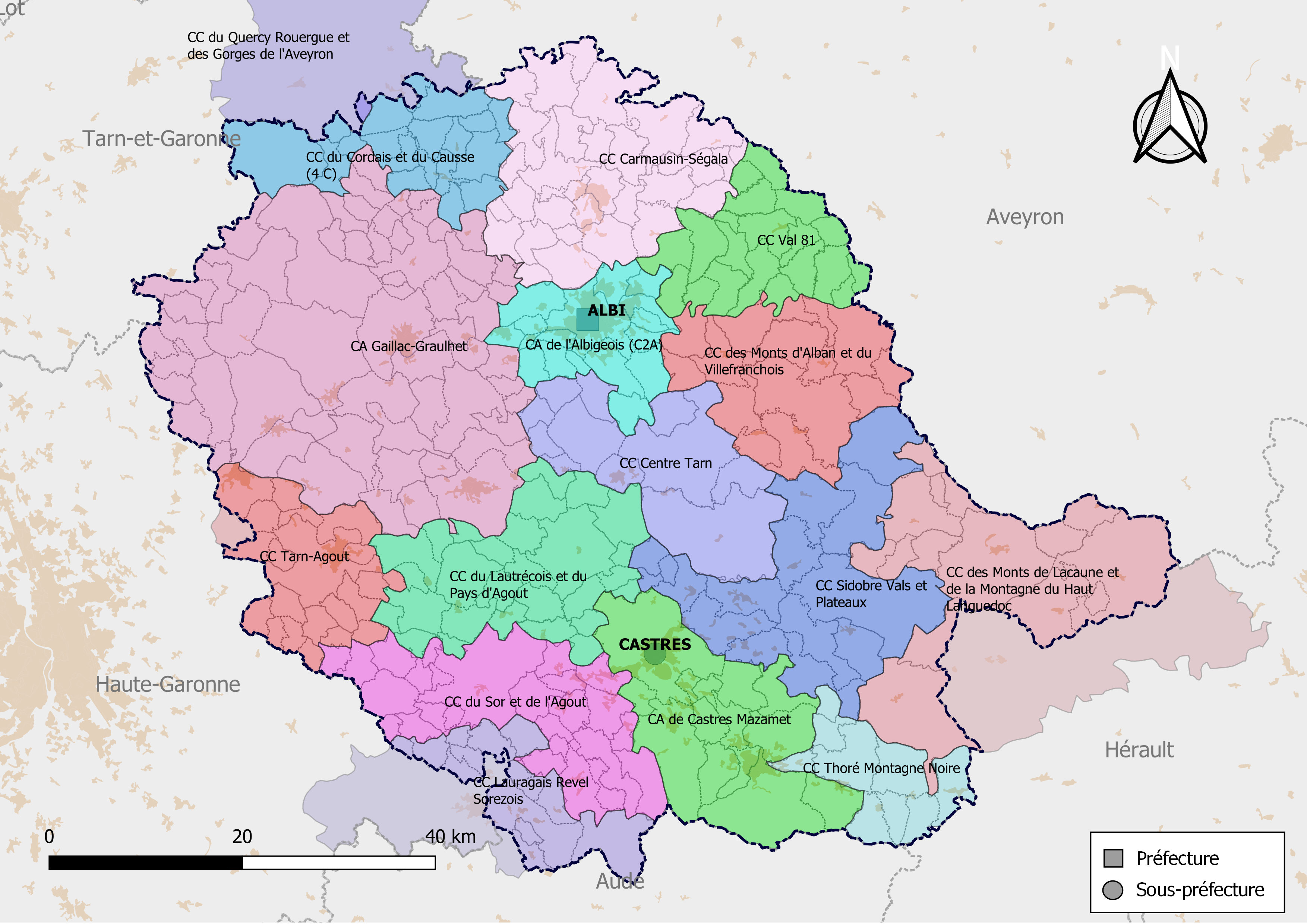 Carte des intercommunalités du département du Tarn, France. Composition au 1er janvier 2019.